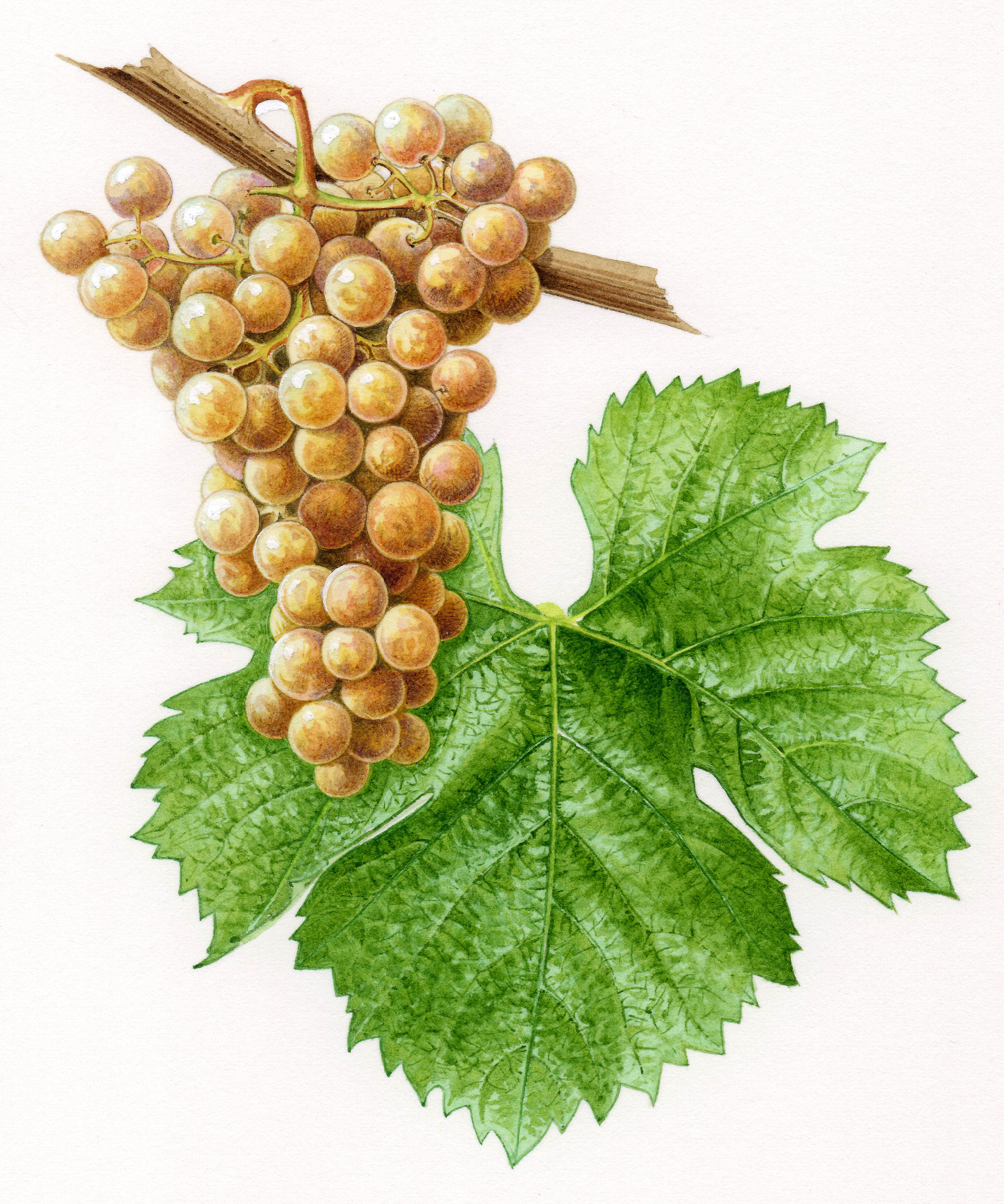 Aquarelle originale pour les Cépages de France (2001)